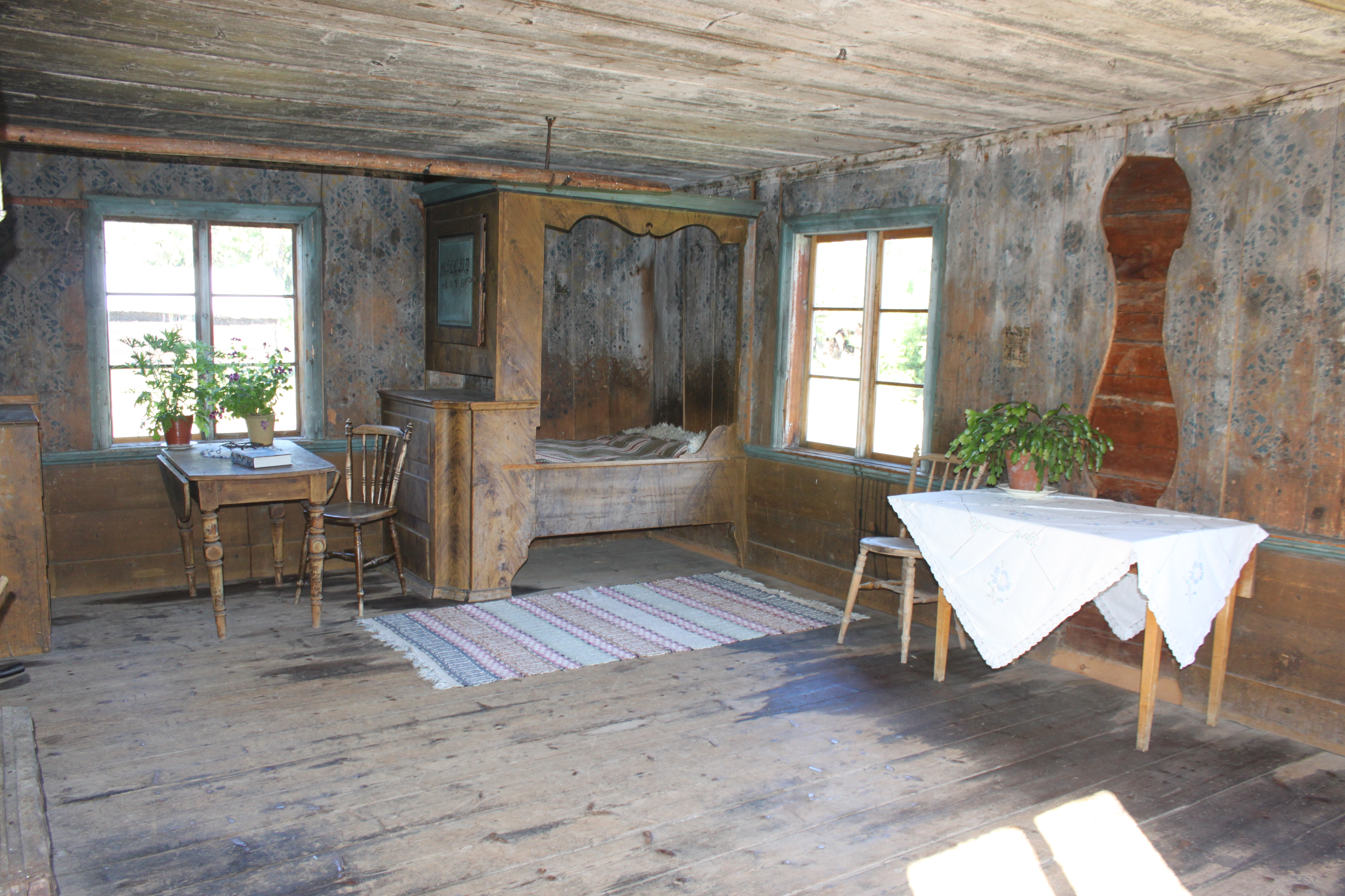 Köket på Hälsingegården Bommars i Letsbo, Ljusdal.